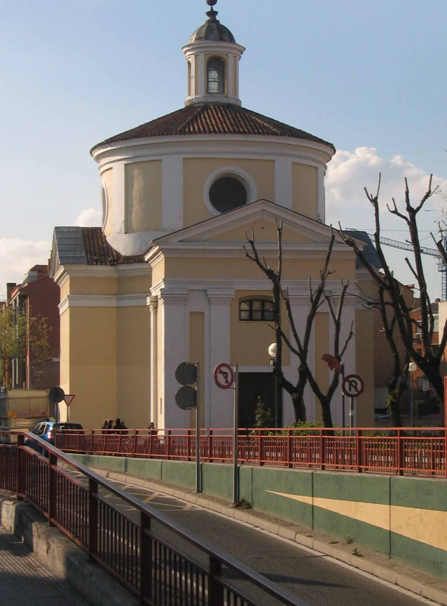 Ermita de San Nicasio en Leganés (Madrid, España).